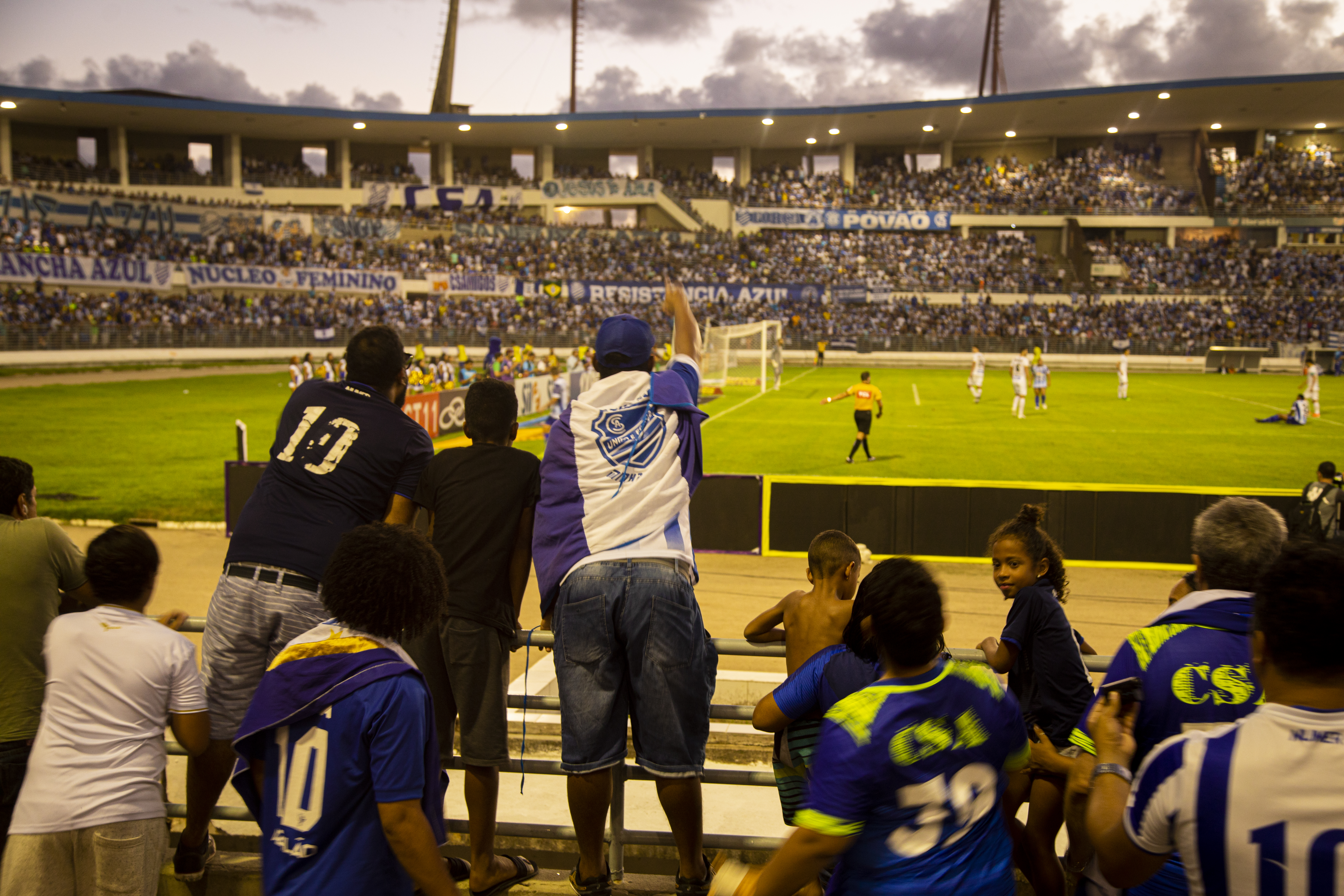 CSA supporters